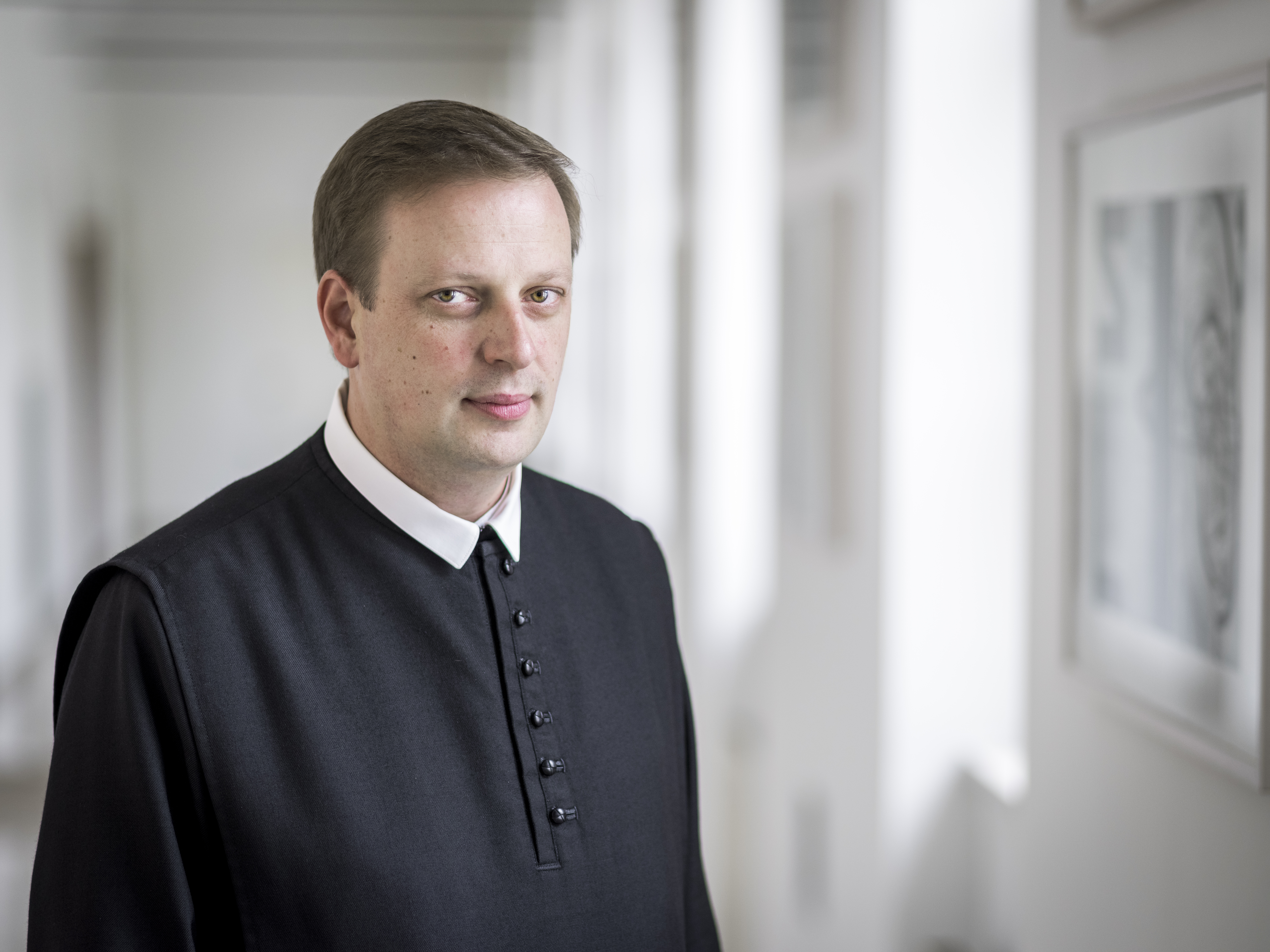 Mag. P. Michael (Christian) Robitschko OSB (C)